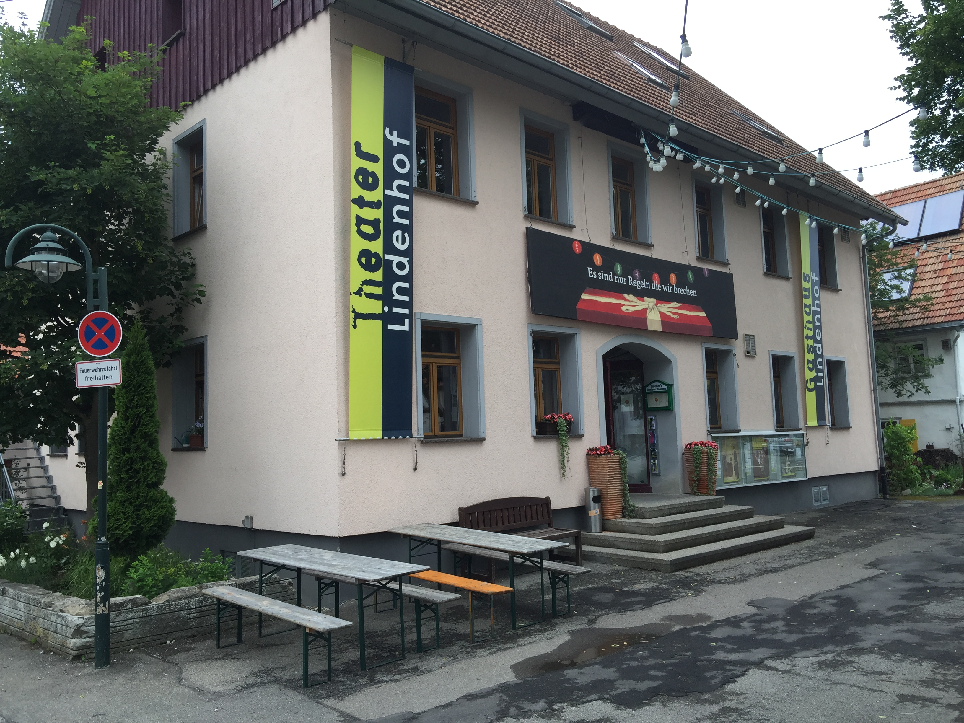 Theater Lindenhof in Melchingen